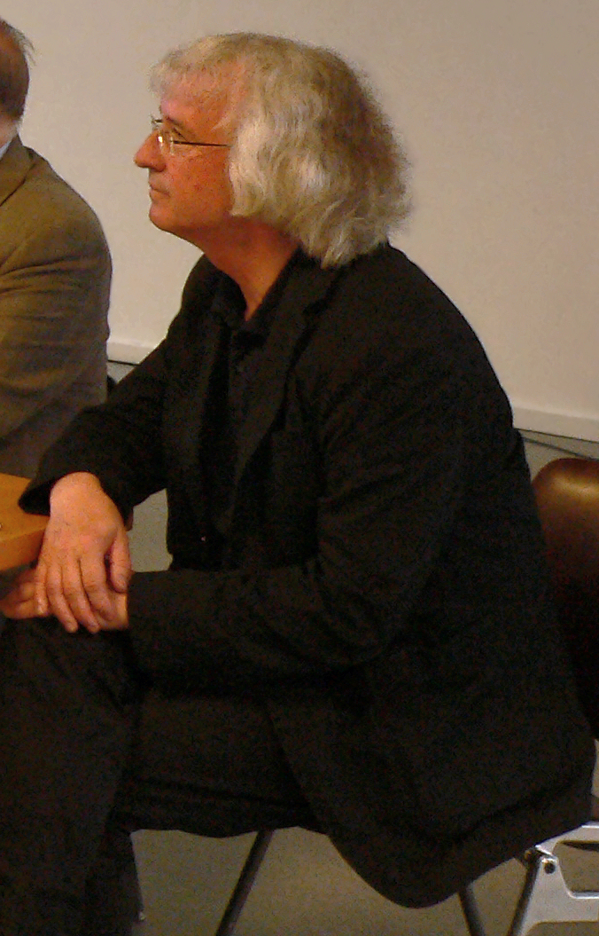 Edgar Ring bei der Pressekonferenz zum Münzschatz von Lüneburg im Museum Lüneburg